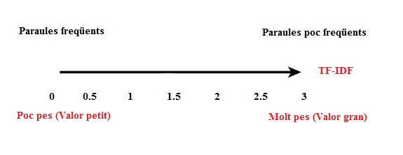 gràfic tf-idf